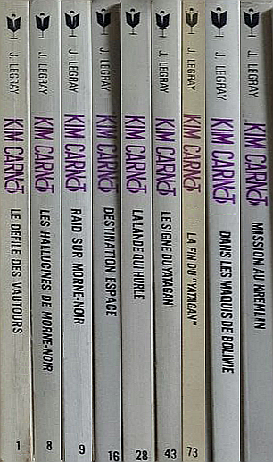 Quelques bouquins Marabout de Kim Carnot.